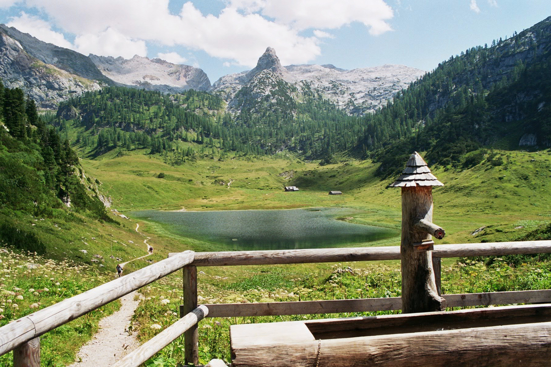 Funtensee im Nationalpark Berchtesgaden